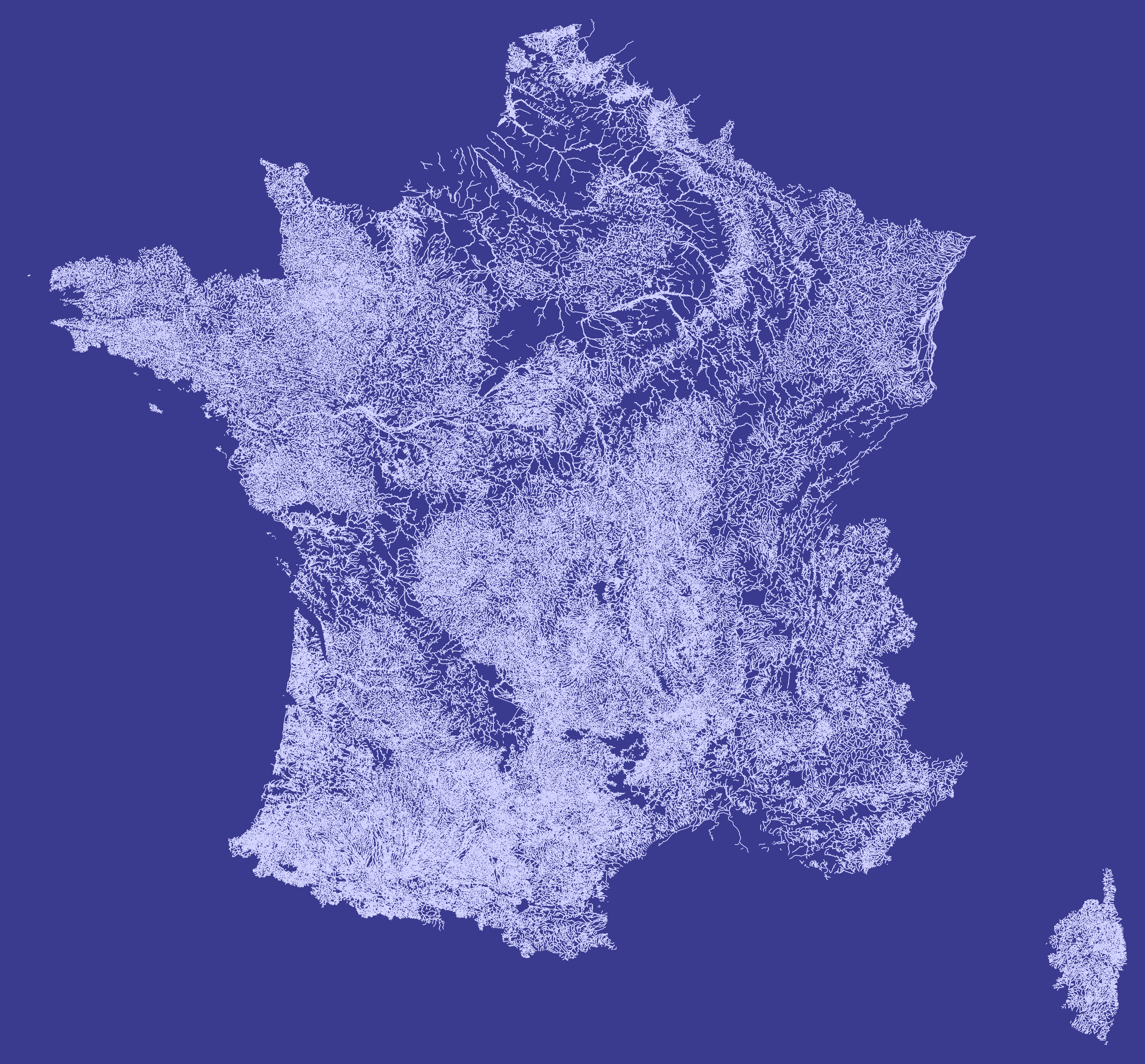 Carte de France du réseau hydrographique, des cours d'eau (rivières et fleuves) (issu database BD Carthage), via QGIS, 2018